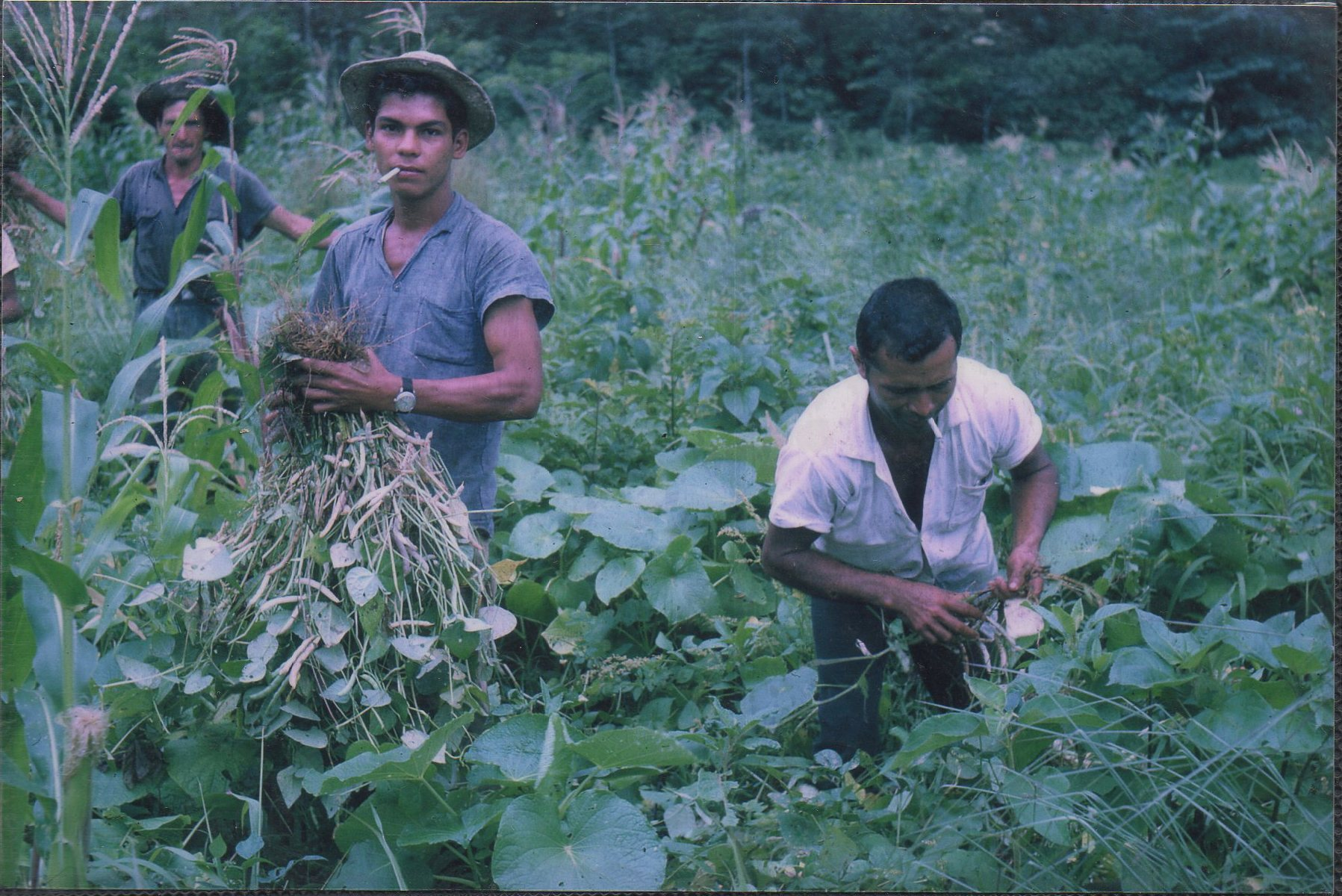 Productos de la zona